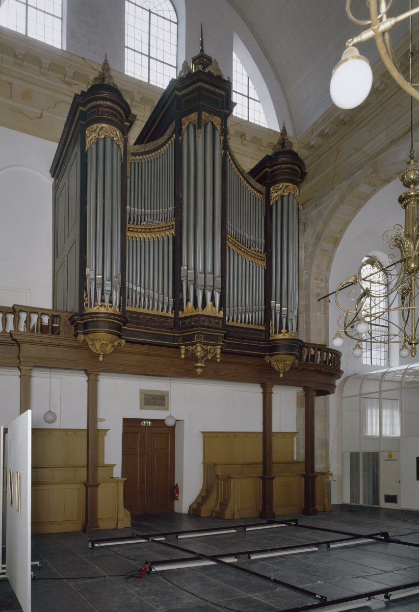 Oosterkerk: Interieur, aanzicht orgel, orgelnummer 64 (opmerking: Gefotografeerd voor Het Historische Orgel in Nederland 1865-1872)